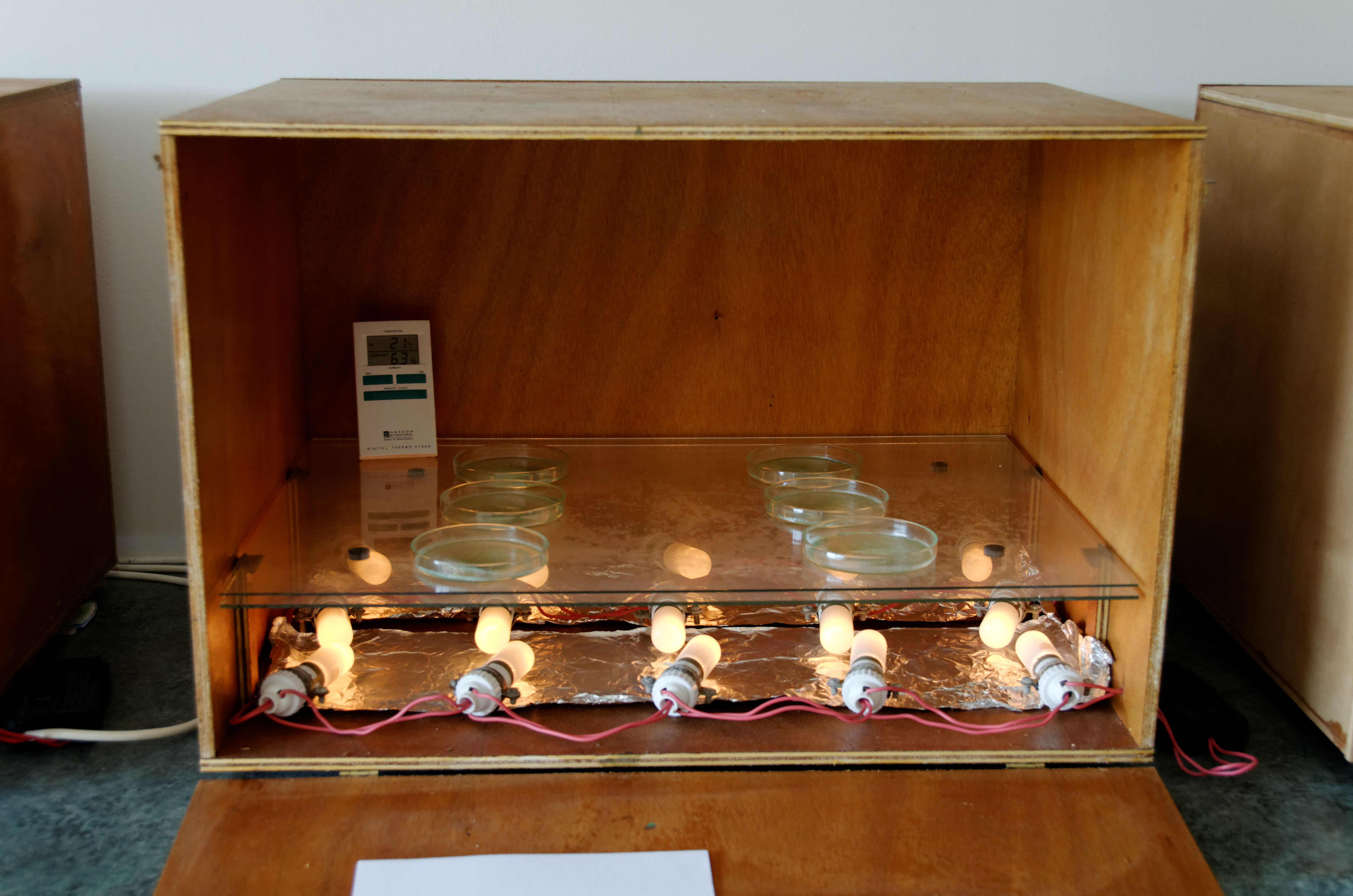 Étuve utilisée pour la réalisation de cristallisations sensibles ou cristallisation au chlorure de cuivre avec additif